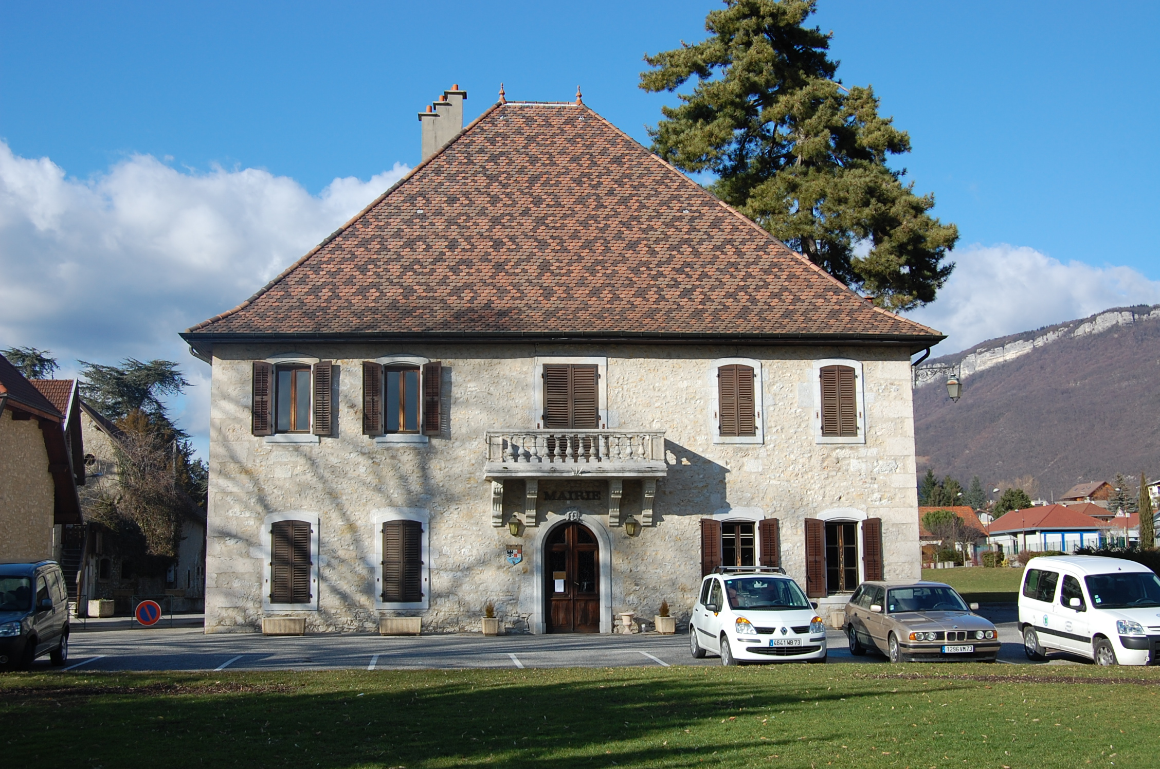 Photo prise le mercredi 11/02/2009 à la mairie de Brison-St.-Innocent, chef-lieu de Brison, en Savoie.